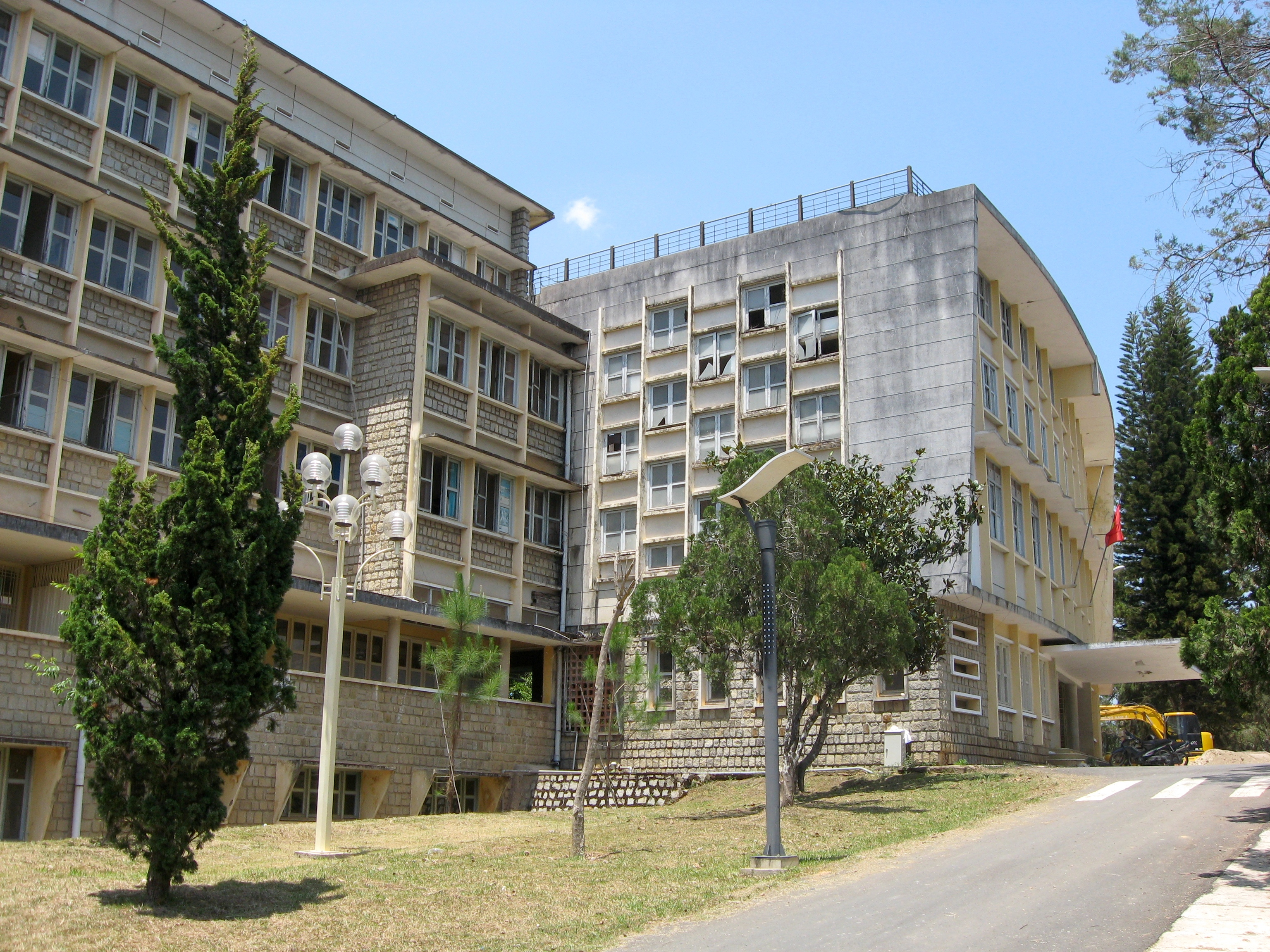 Trung tam Dao tao cua Vien nghien cuu hat nhan Da Lat